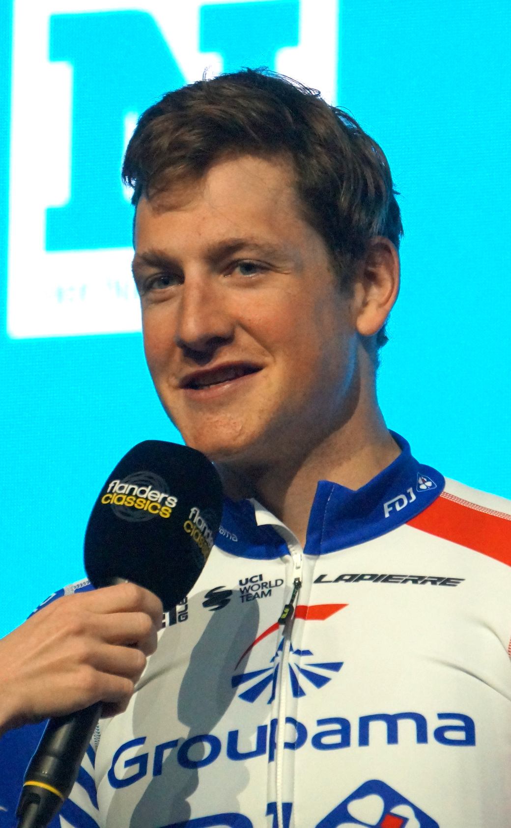 Stefan Küng bij de ploegenvoorstelling in Gent voor de Omloop Het Nieuwsblad 2020